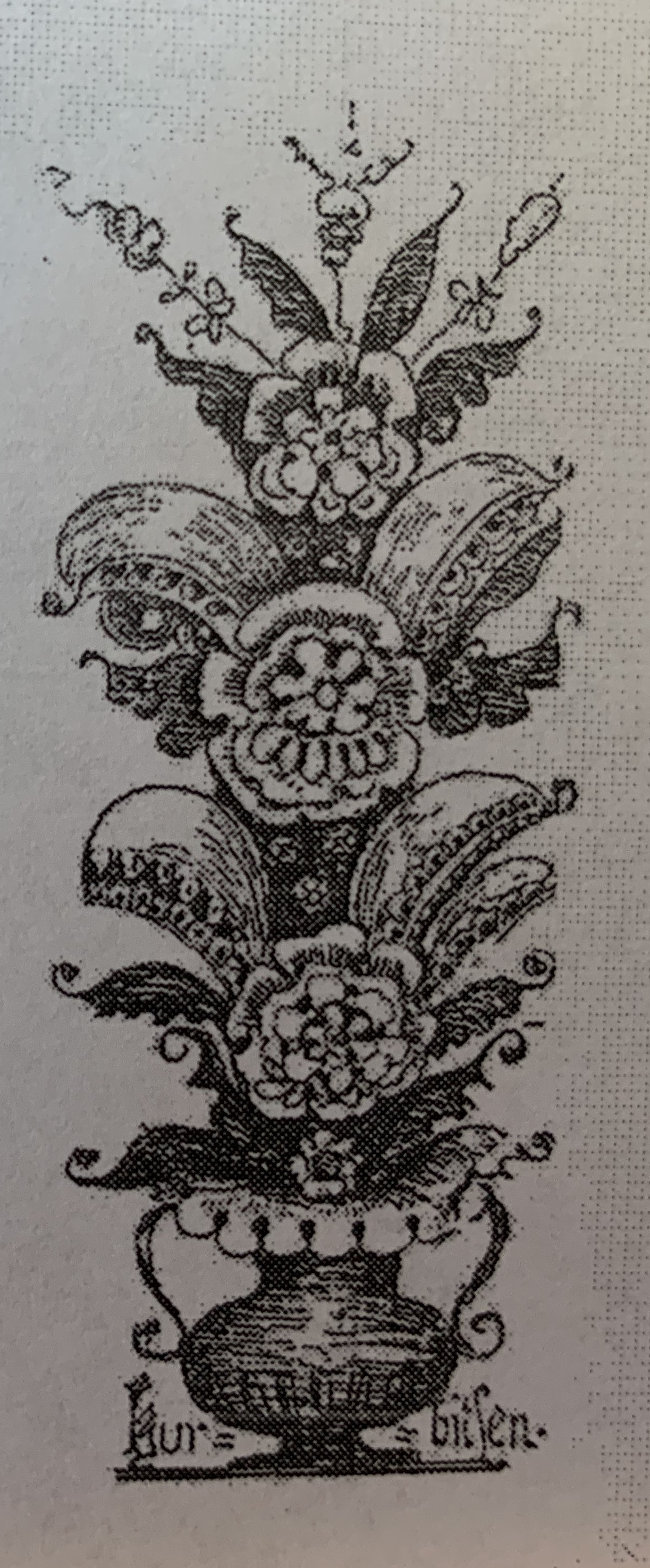 Første kjente, publiserte bruk av betegnelsen «kurbits» på dalmålarnas overdådige fantasiblomst